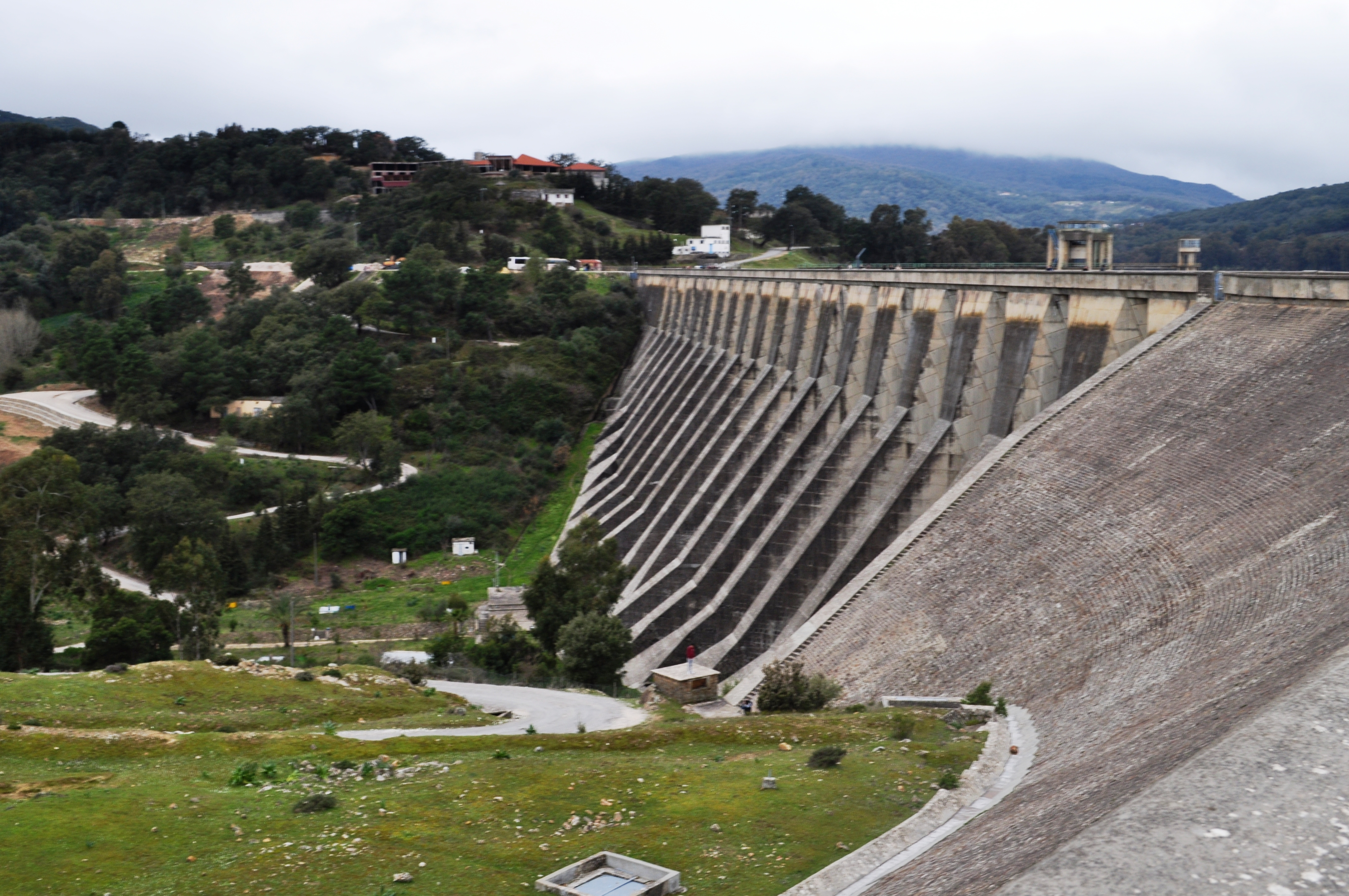 vue de l'exterieur du barrage